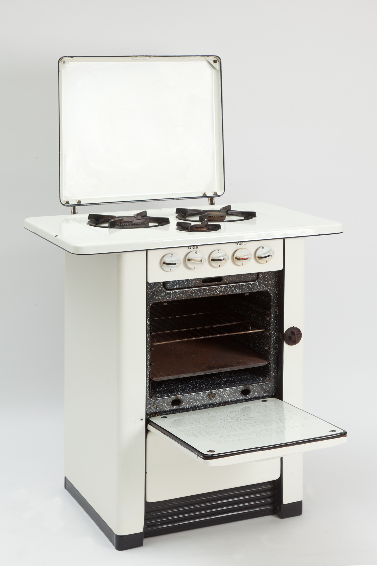 Cucina. Esposta al Museo nazionale della scienza e della tecnologia Leonardo da Vinci di Milano.